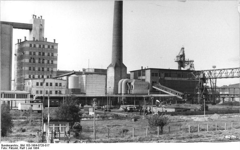 Güstrow, Zuckerfabrik ADN-ZB Pätzold-20.7.84 Bez. Schwerin: 35. Jahrestag-Entstanden in der DDR- Zu den modernsten und leistungsfähigsten Betrieben ihrer Art in der DDR gehört die Zuckerfabrik Güstrow, Stammbetrieb der VEB "Nordkristall" zusammengeschlossenen Werke Güstrow, Wismar, Tessin und Lübs. Tausende Tonnen Zuckerrüben können hier täglich verarbeitet werden. Der Betrieb nahm im Oktober 1962 die Arbeit auf.